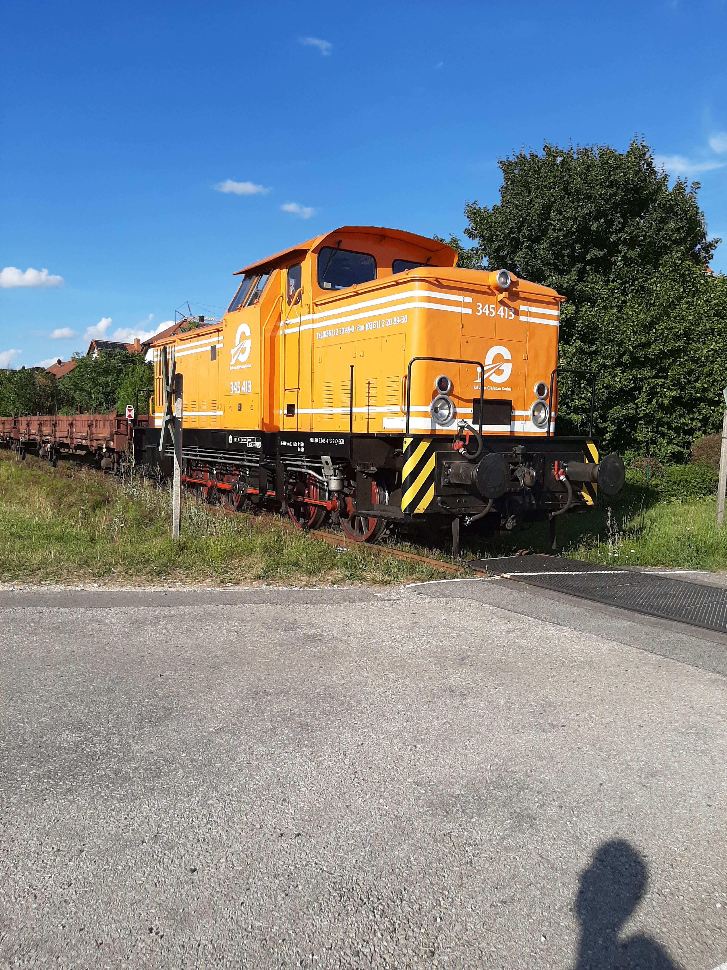 Baureihe 345 bei Ausfahrt aus Reckendorf.